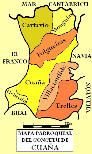 Mapa parroquial del conceyu de Cuaña, dixebráu por colores.